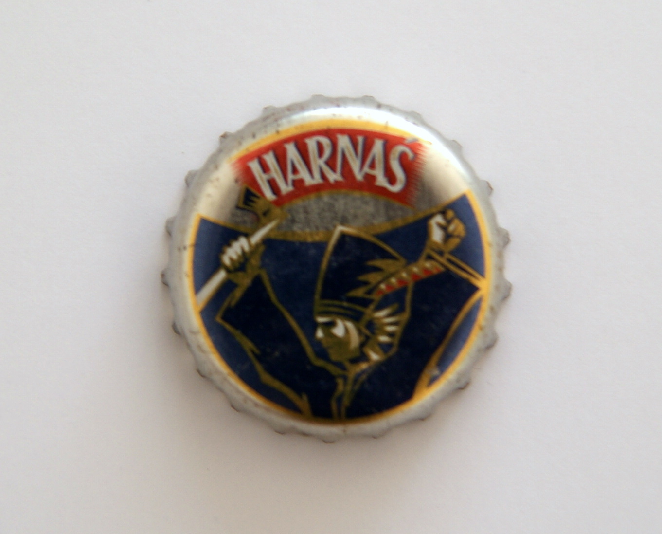 Kapsel piwa Harnaś